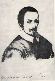 Иван Бунич Вучич (хорв. Ivan Bunić Vučić; 1591/92 — 1658) — хорватский поэт XVII века и государственный деятель Дубровницкой республики.